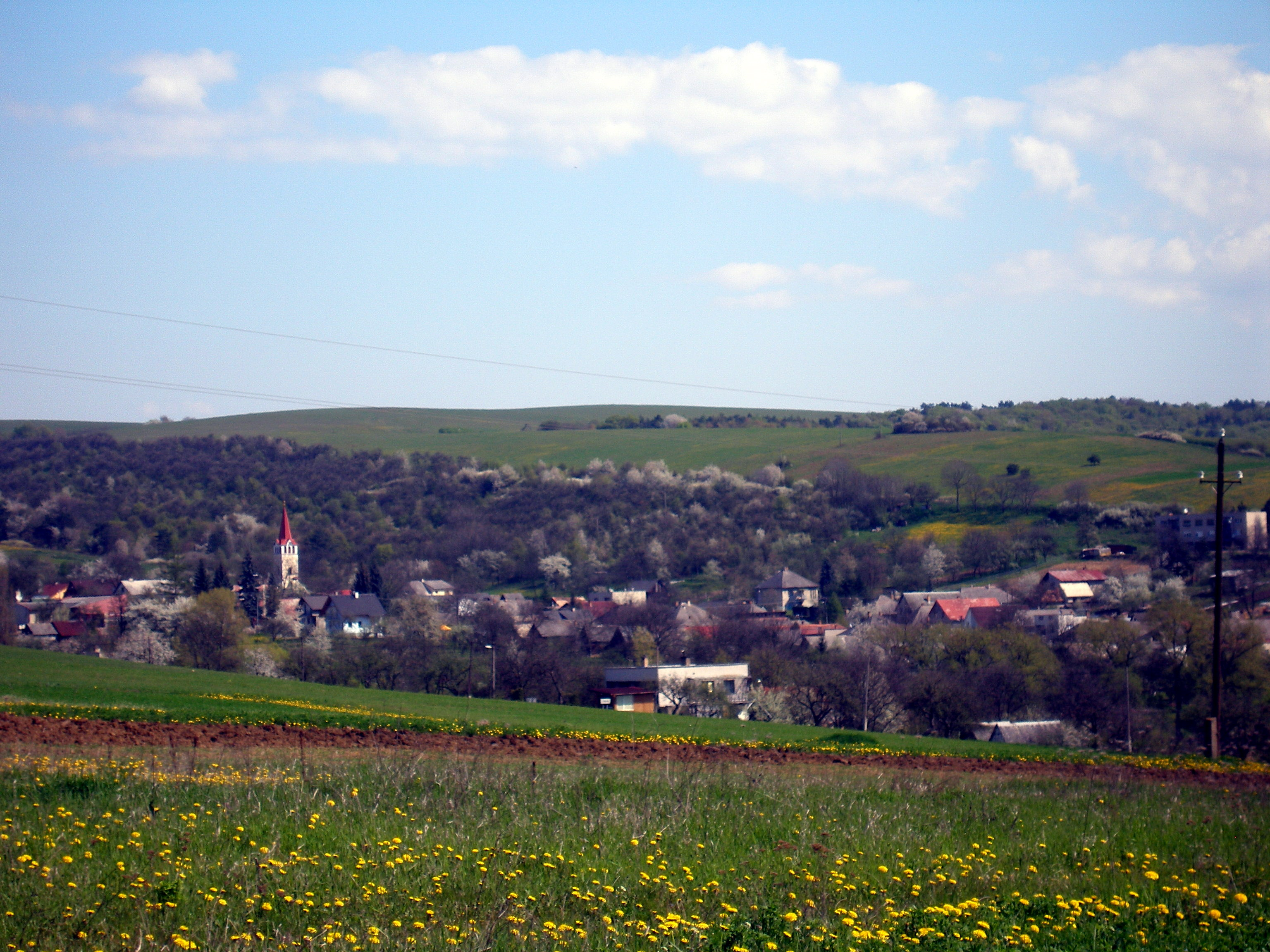 Obec Pušovce okres Prešov región Šariš